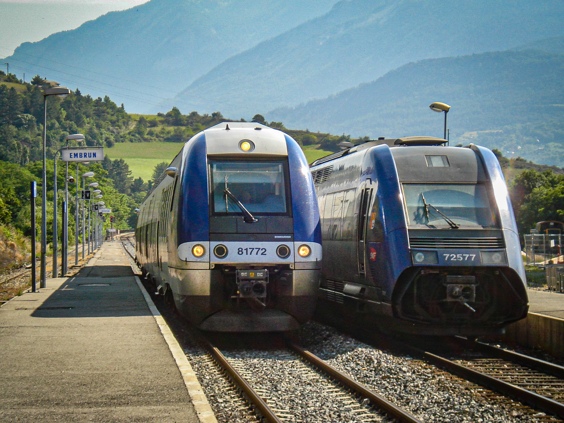 Croisement de deux TER à Embrun